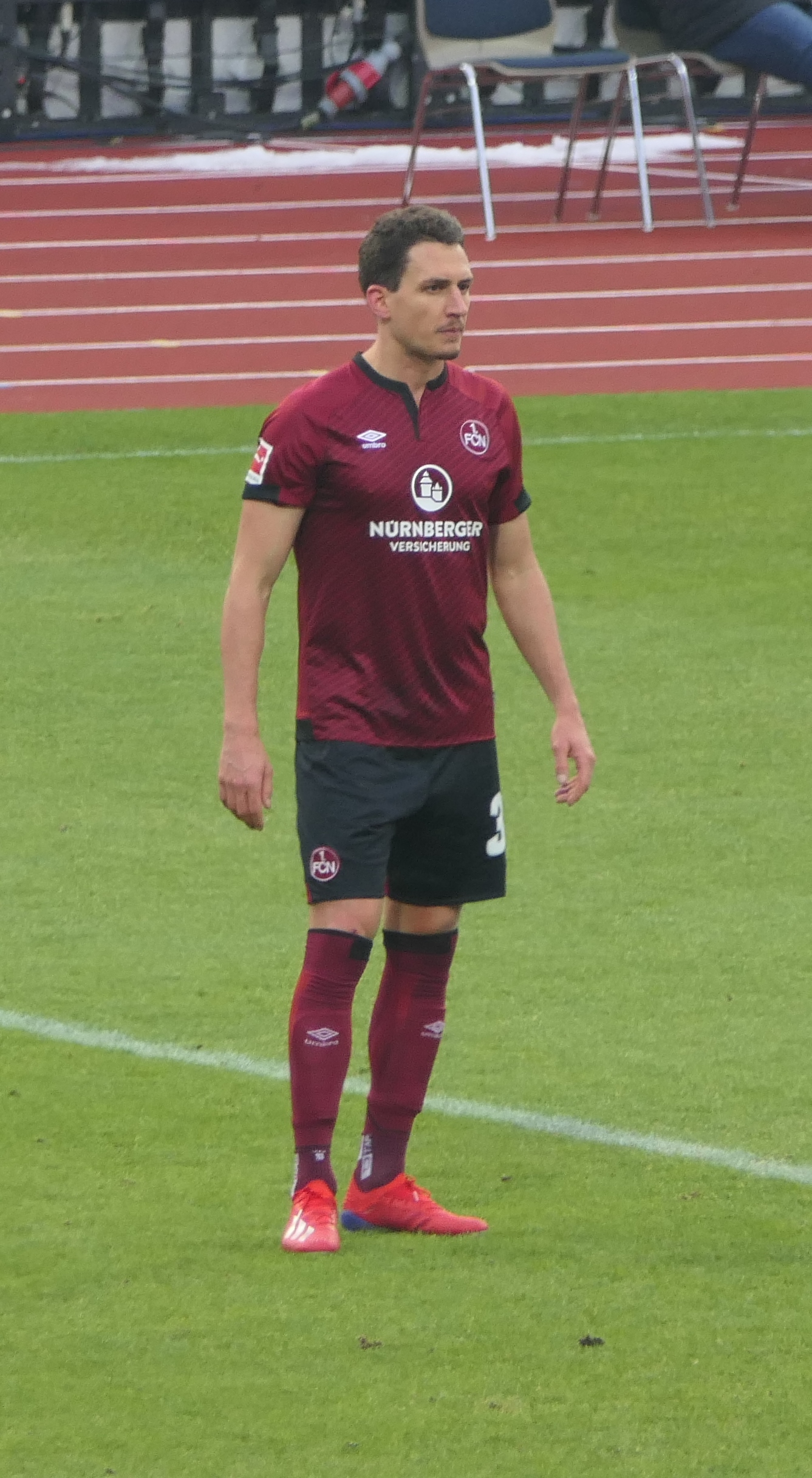 Der Fussballprofi Georg Margreitter vom 1.FC Nürnberg beim Heimspiel gegen Werder Bremen am 02.02.2019.